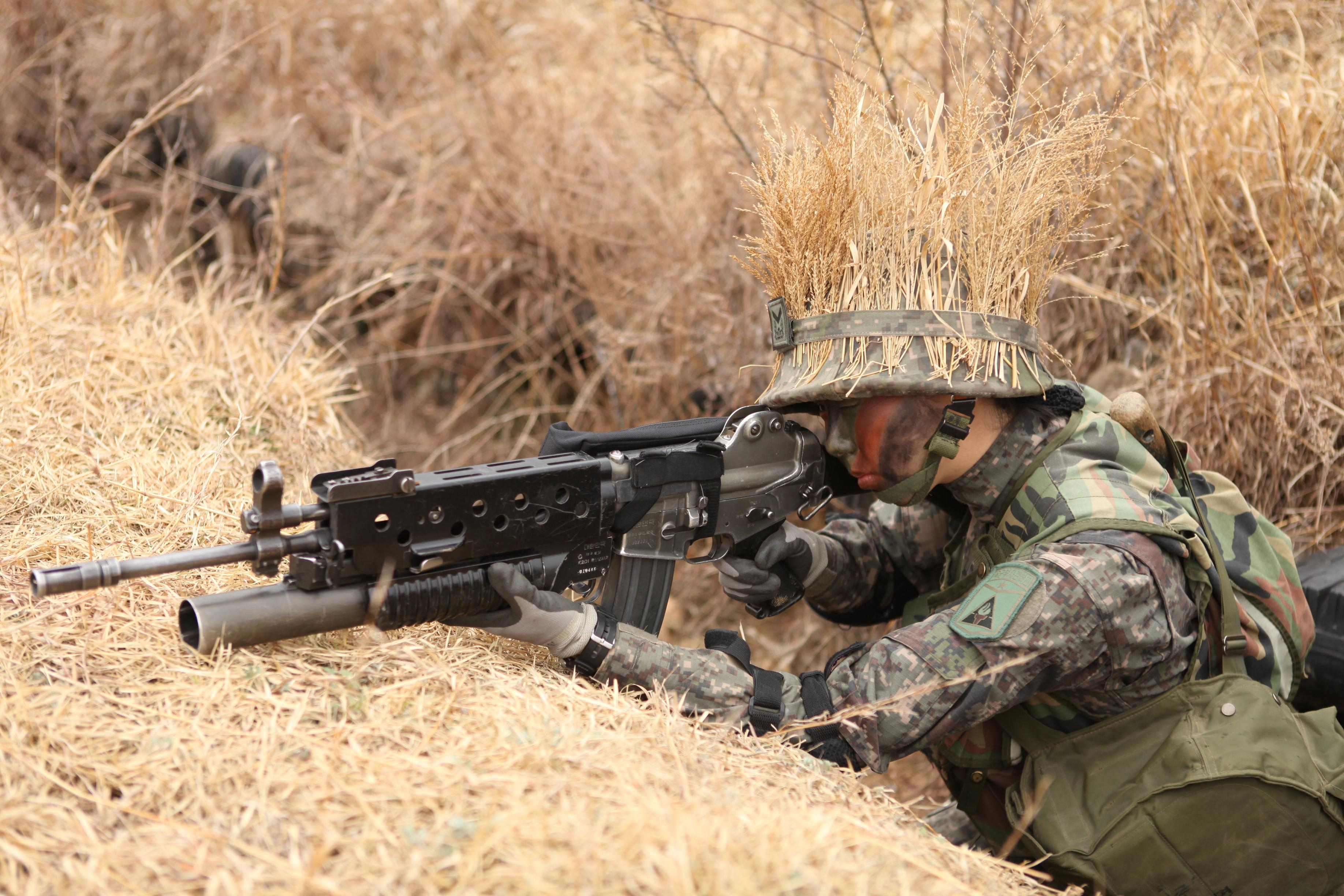 3월 27일 부사관의 날을 맞아 육군 부사관 학교 교육생들이 실전적인 소부대 전투훈련을 실시하고 있는 모습